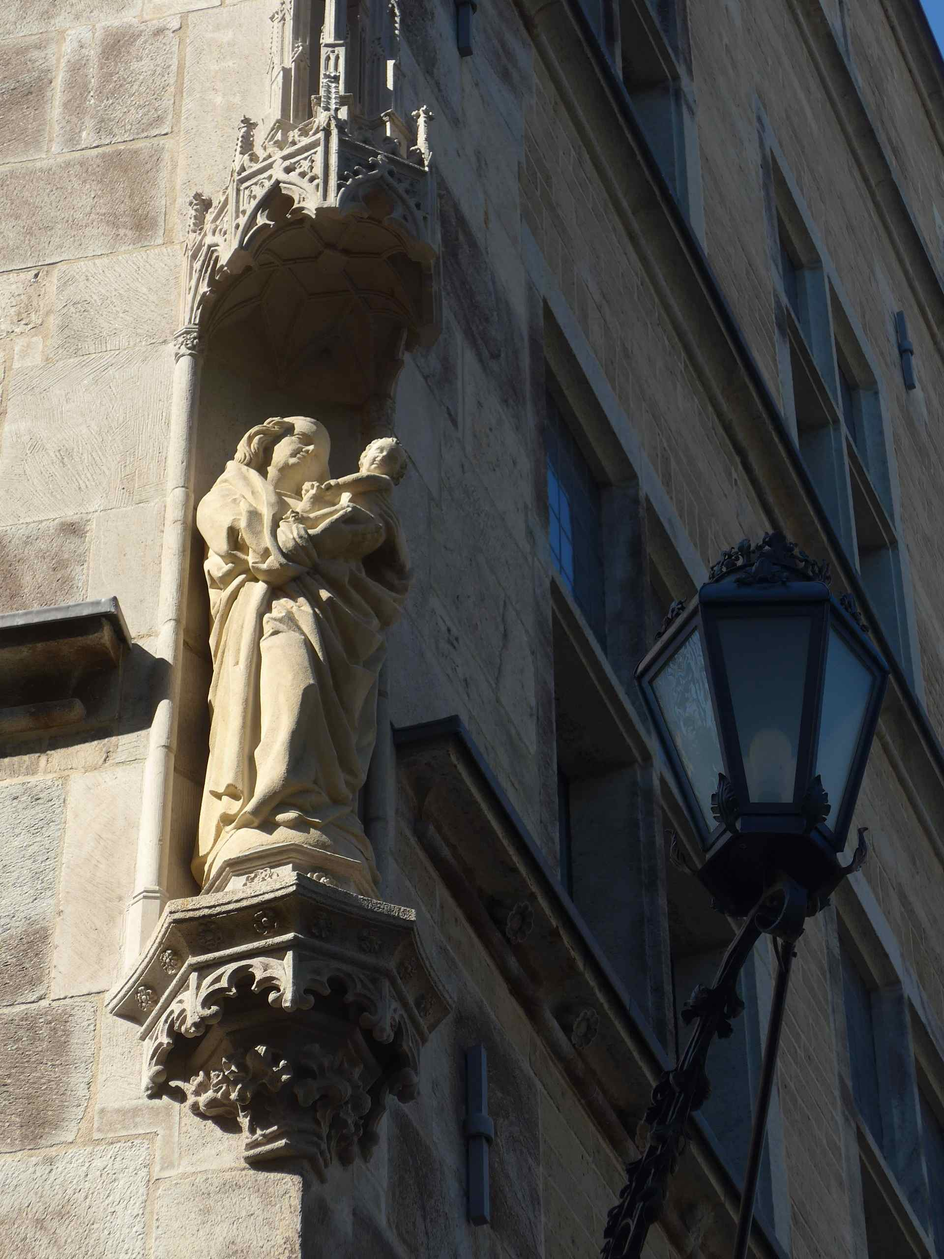 Haus Saaleck, Am Hof 50, Marienbild This is a photograph of an architectural monument.